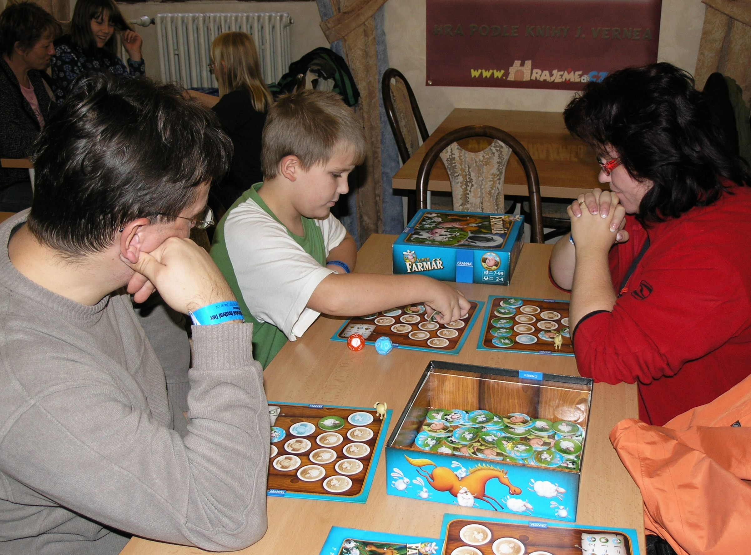 Deskohraní 2008 - Superfarmář deluxe